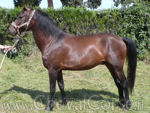 Acellu Di Paradisu Etalon Corse